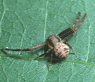 juvenile Ebelingia kumadai (Ono, 1985) (Syn.: Misumenops kumadai) from Okinawa.